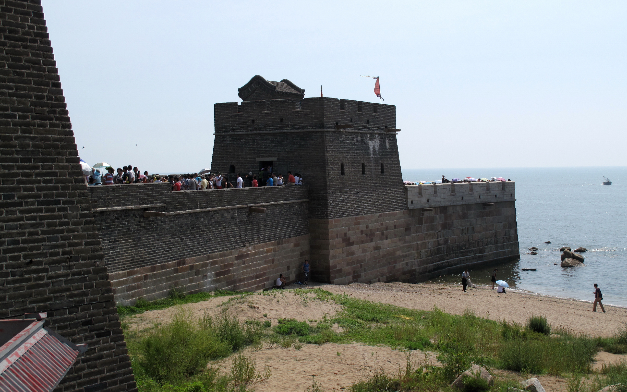 山海关长城老龙头入海石城部分